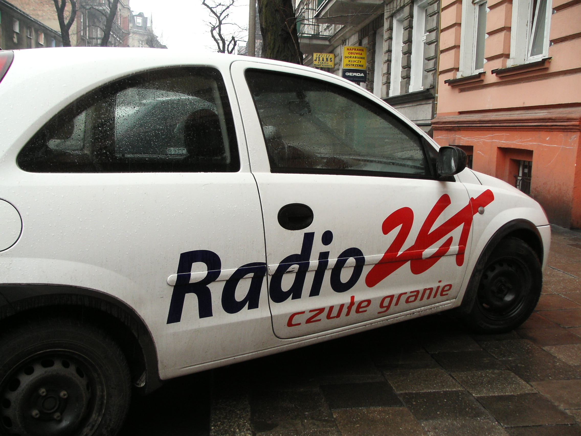 Lokalny samochod Radia Zet w Poznaniu